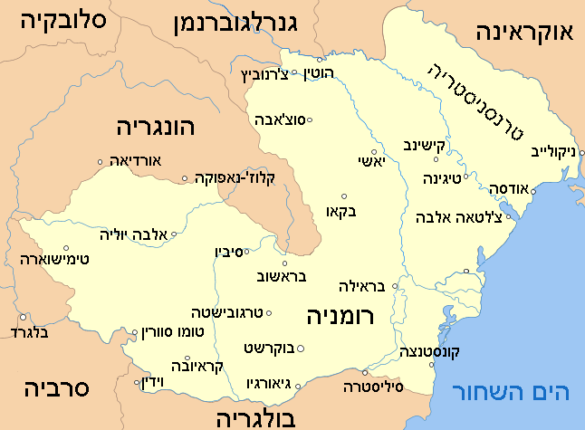 Romania 1942